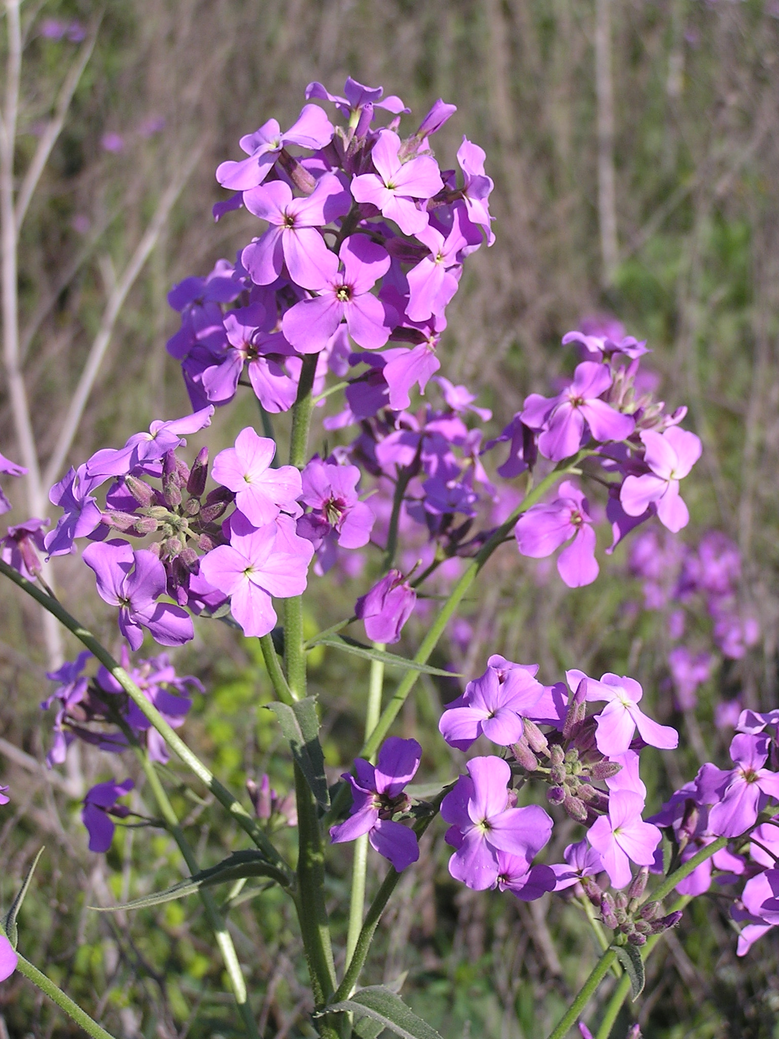 Растение